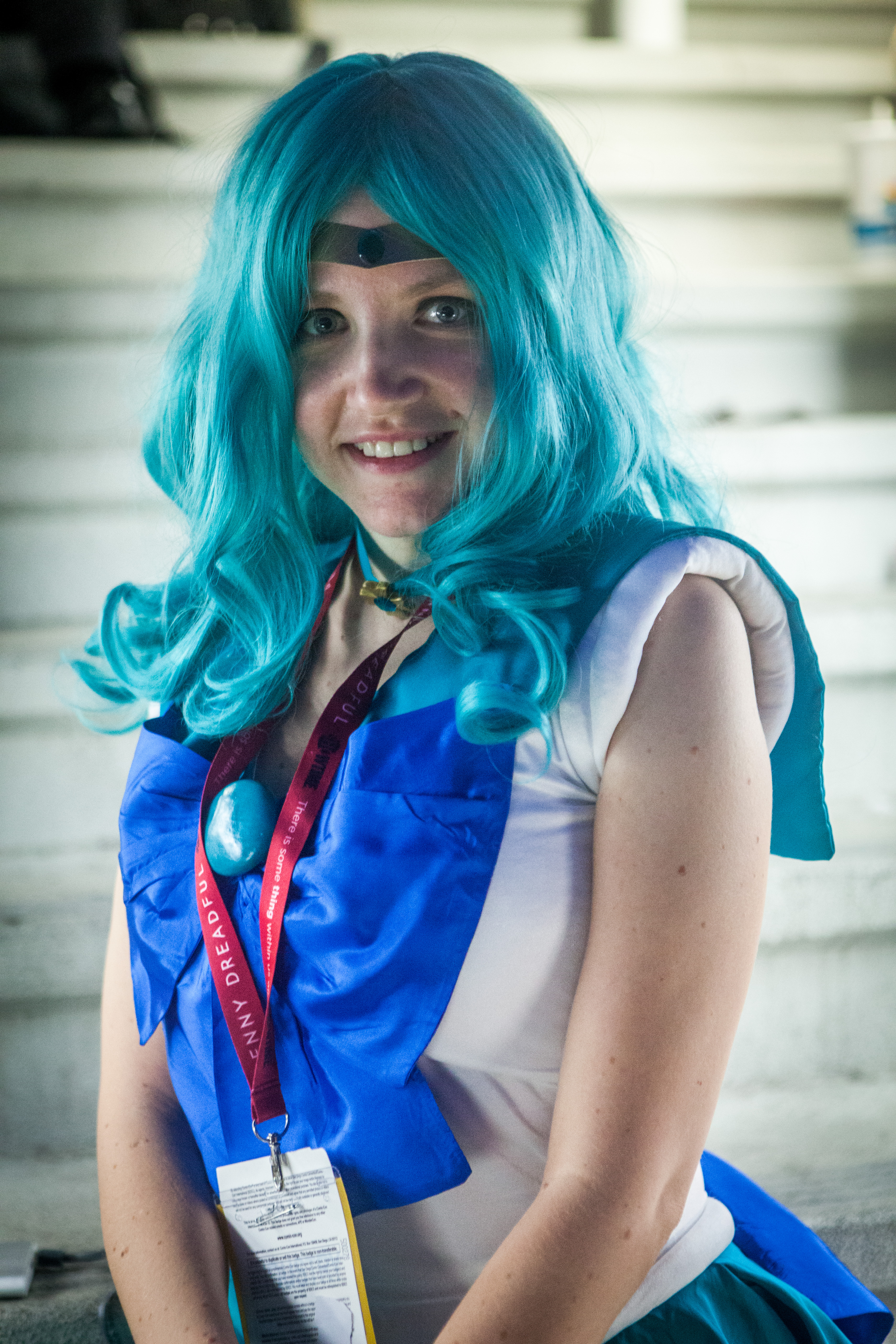 San Diego Comic Con 2014-1415